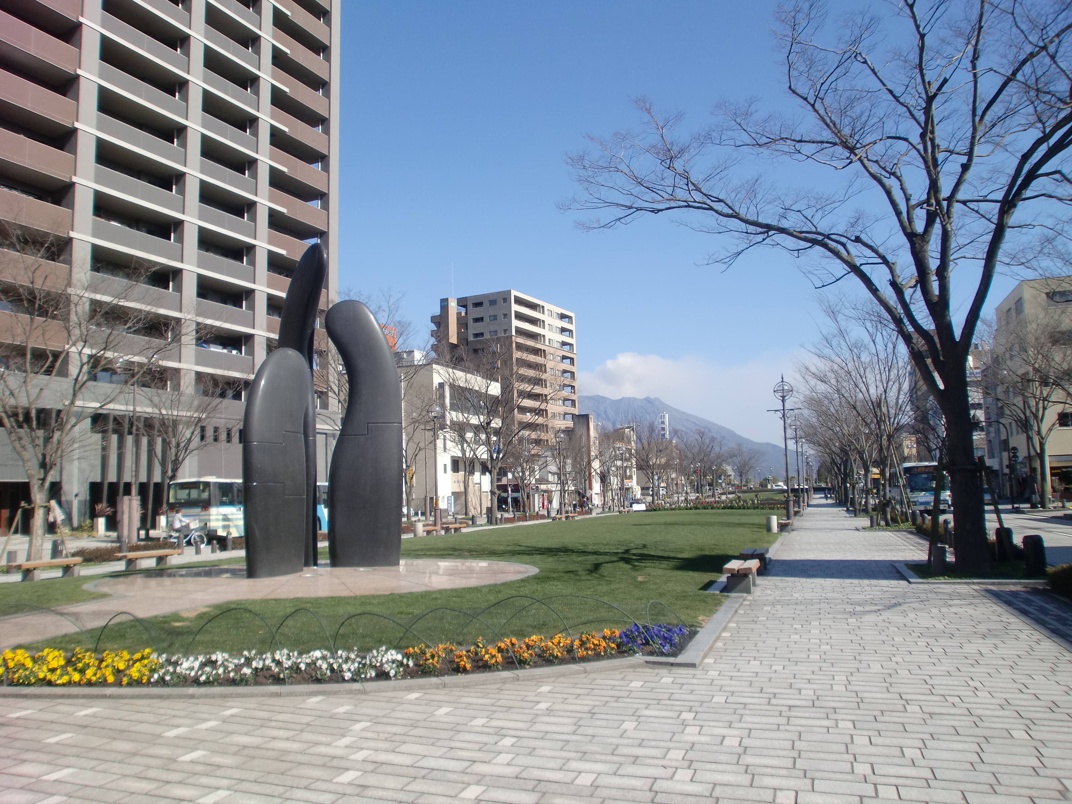 鹿児島県鹿児島市にあるみなと大通り公園から桜島方面を望む。